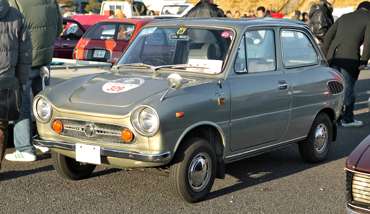 Suzuki Fronte 360 Super Deluxe ( LC10 )